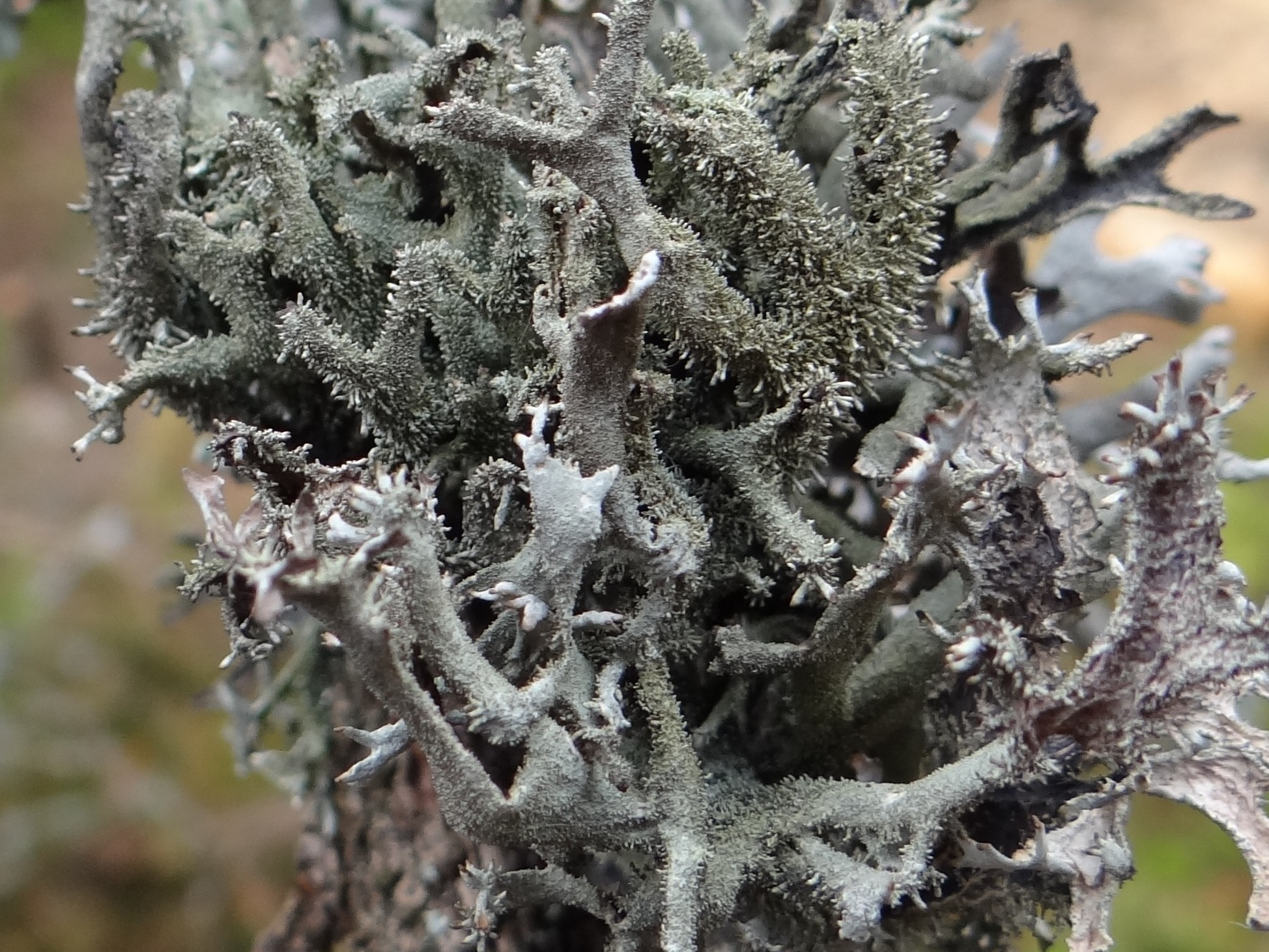 Pseudevernia furfuracea